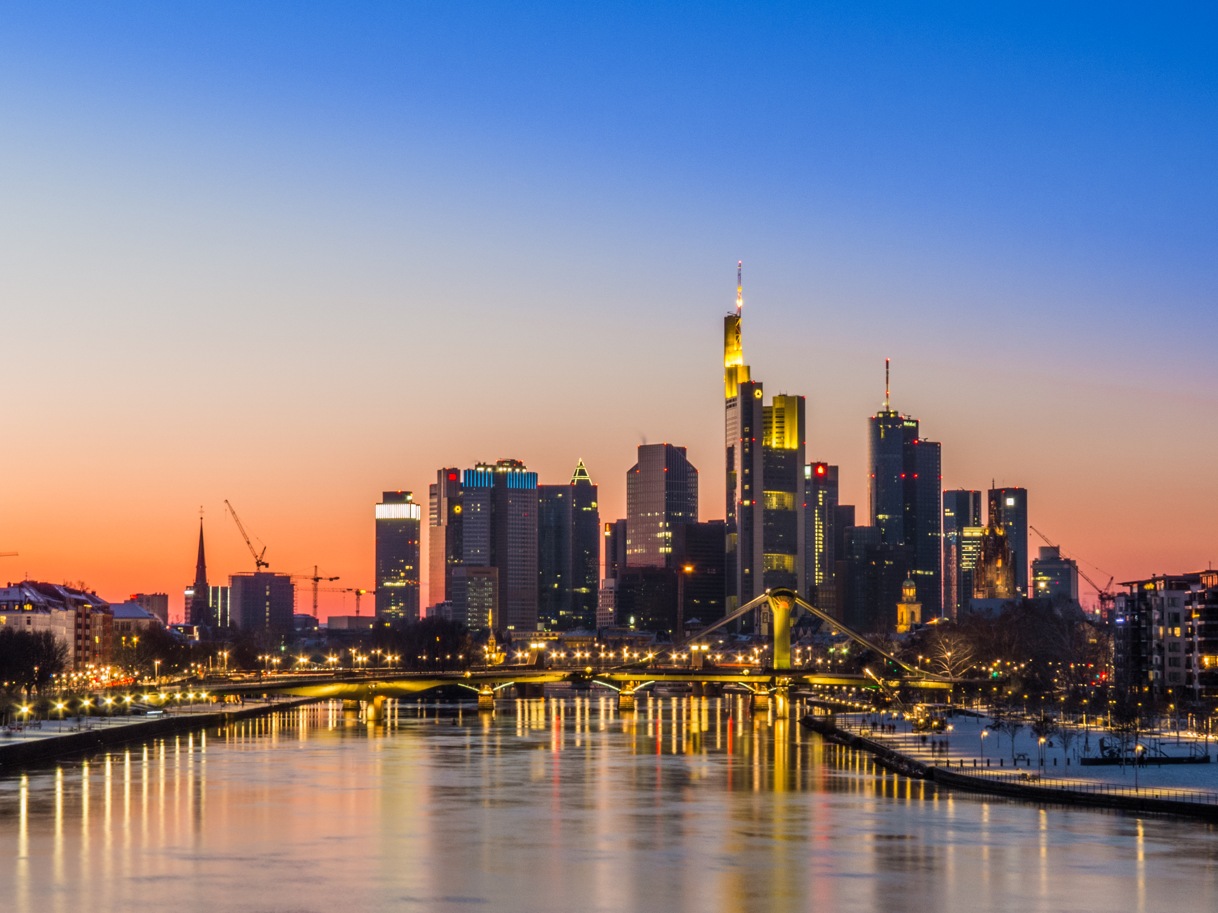 Frankfurt Skyline